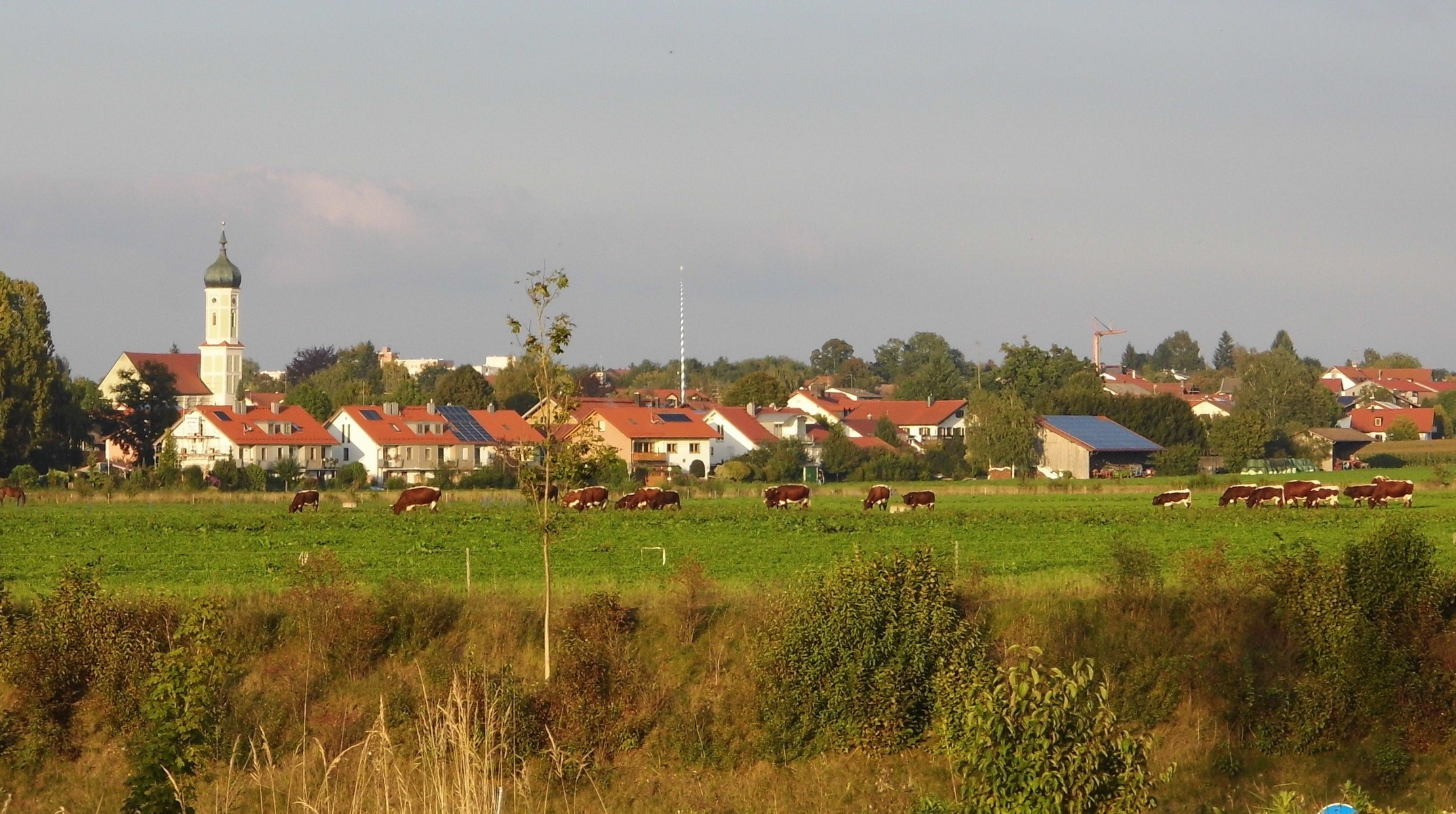 Zorneding mit kath. Kirche St. Martin, in der Ortsmitte der Maibaum, und auf der Weide in Vordegrund die 'Pinzgauer Mutterkuh-Herde'. Gesehen aus südwestlicher Richtung nahe der B304 am 15.Sept. 2014